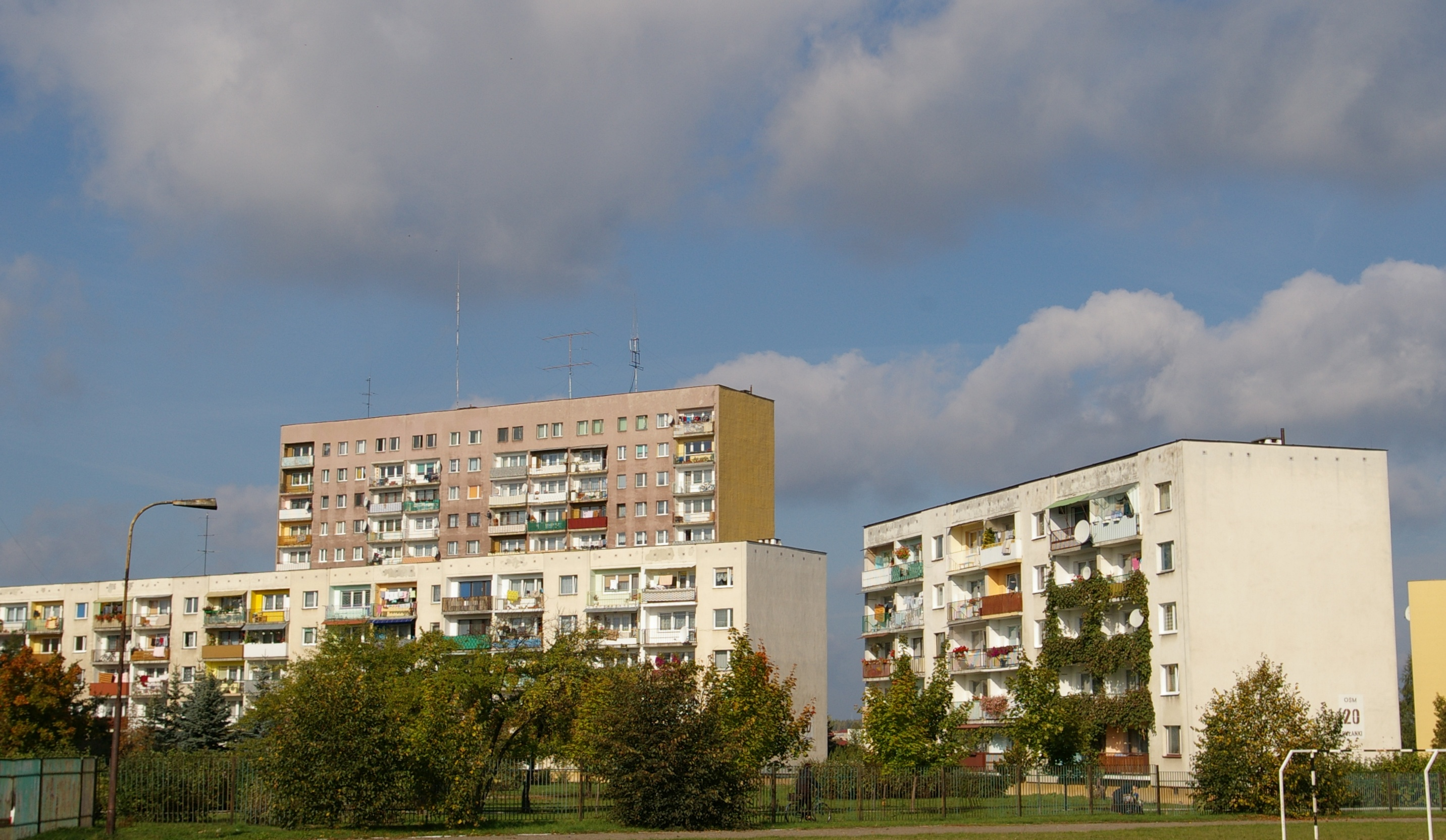 Bloki na osiedlu Pułanki w Ostrowcu Świętokrzyskim